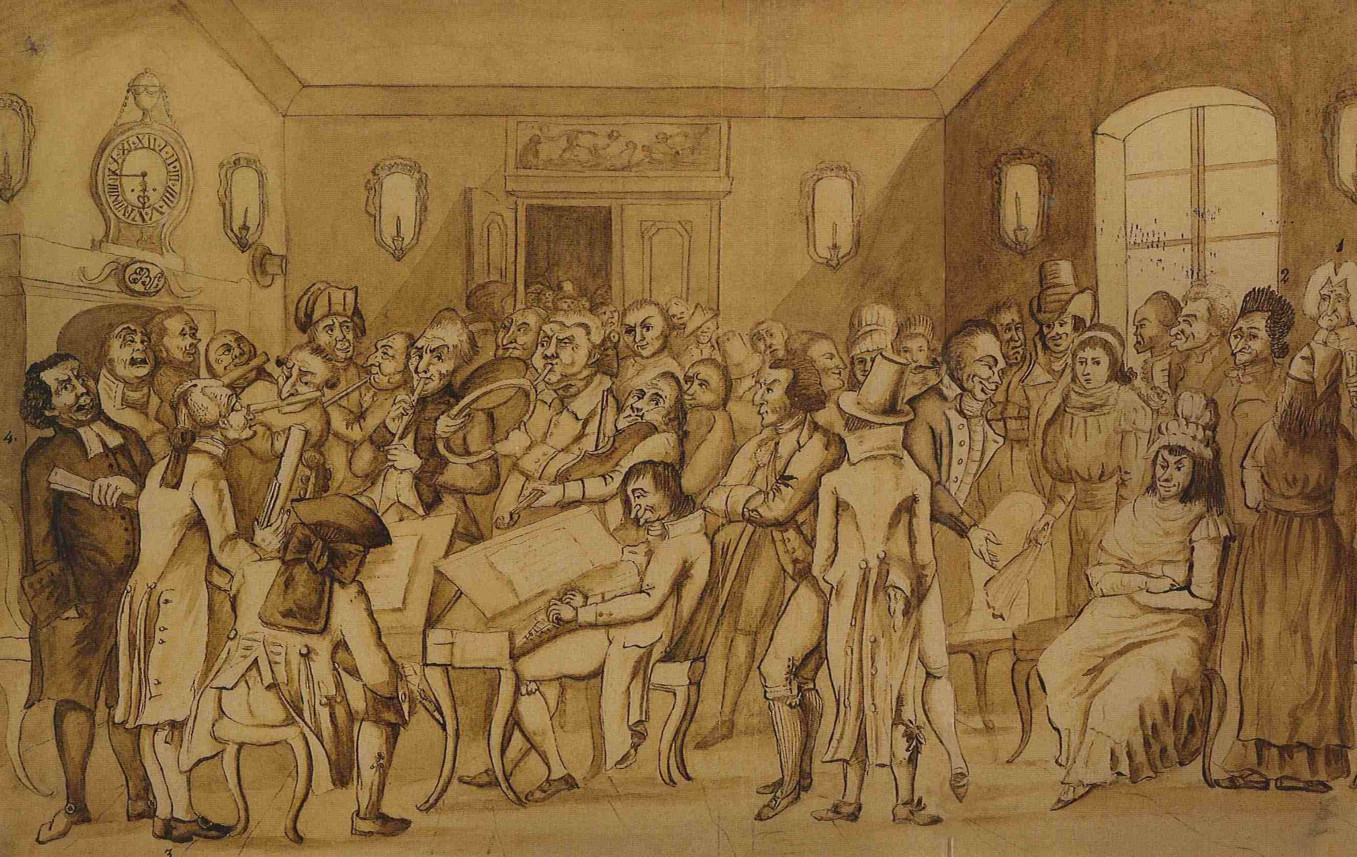 Emanuel Burckhardt-Sarasin: ein liebhaber Concert, Karikatur des Veranstaltungsbetriebs im Basler Collegium musicum während des ausgehenden 18. Jahrhunderts. Lavierte Tuschezeichnung.